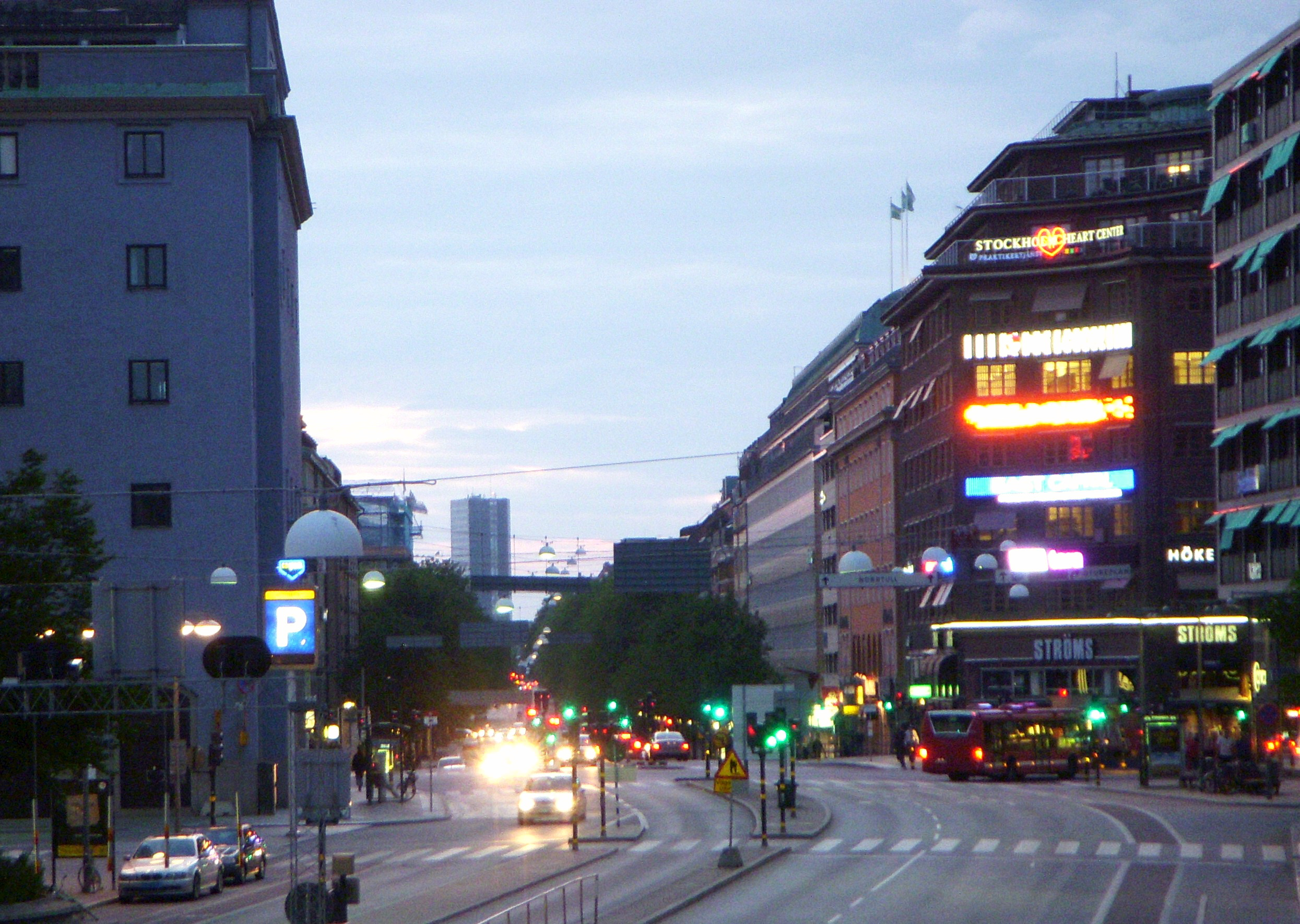 Sveavägen i Stockholm, mot norr, i bakgrunden syns Wenner-Gren Center